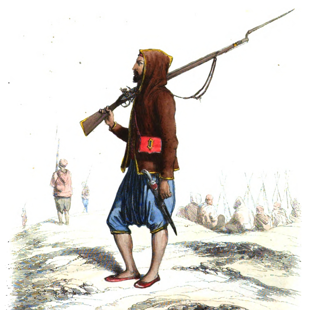 Régiments envoyés en Afrique de 1830 à 1843 - Infanterie régulière d'Abd el Kader